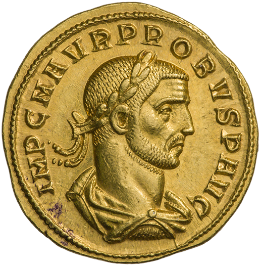 Ауреус. Проб. Ок. 276—282 гг. (аверс). Надпись IMP C MAVR PROBVS P AVG. Бюст Проба в панцире и плаще, вправо; на голове лавровый венок.